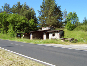 Kalkbrennofen an der Straße von Stroheich nach Nohn, etwa auf halber Strecke zwischen Niederehe und Nohn.